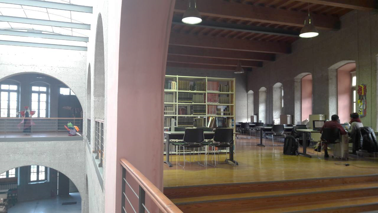 Η βιβλιοθήκη προσφέρει ιδανικό περιβαλλον αναψυχής και εργασίας των φοιτητών.